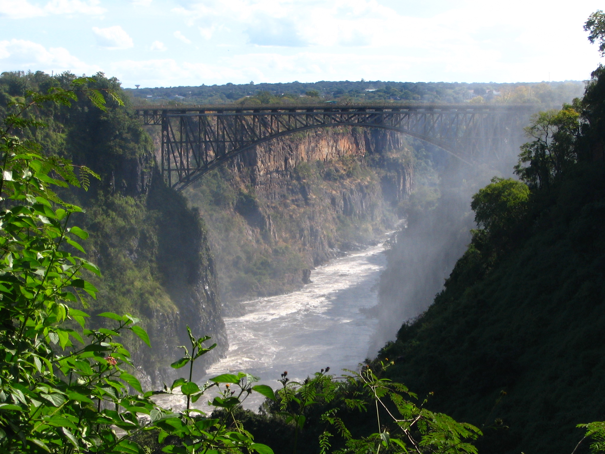 Victoria Falls Bridge, Zimbabwe-Zambia, 13/04/2006